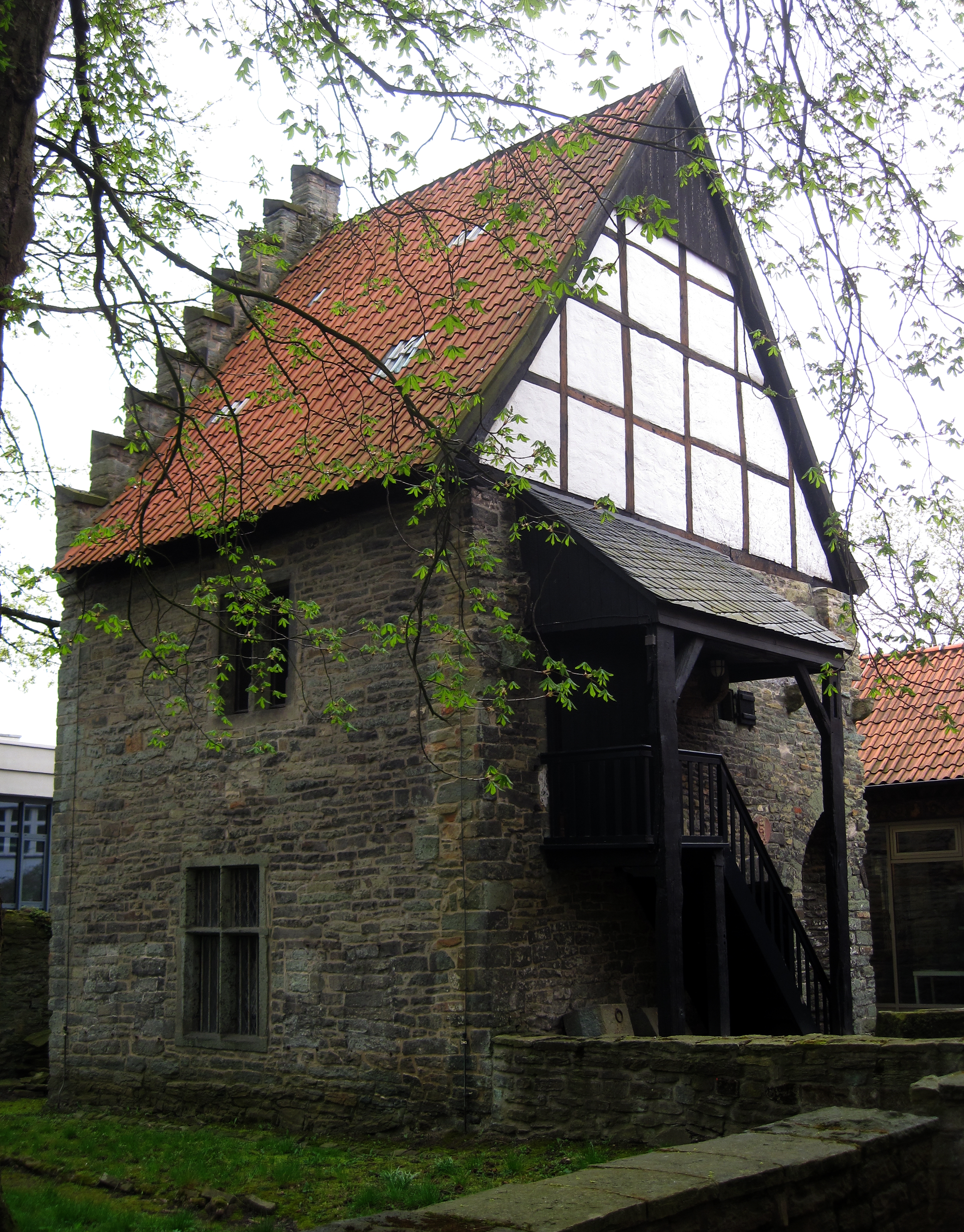 Ehemaliges Wohnhaus, jetzt Romanisches Haus, Pollhofstraße 23 in Soest. This image shows a heritage building in Germany, located in the North Rhine-Westphalian city Soest (no. 465).